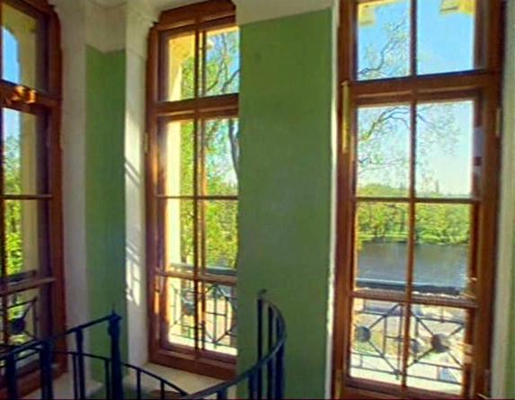 башня Царицына павильона